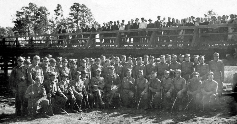 Беларуская (тарашкевіца): 25-ы полк вялікапольскіх уланаў у Пружане